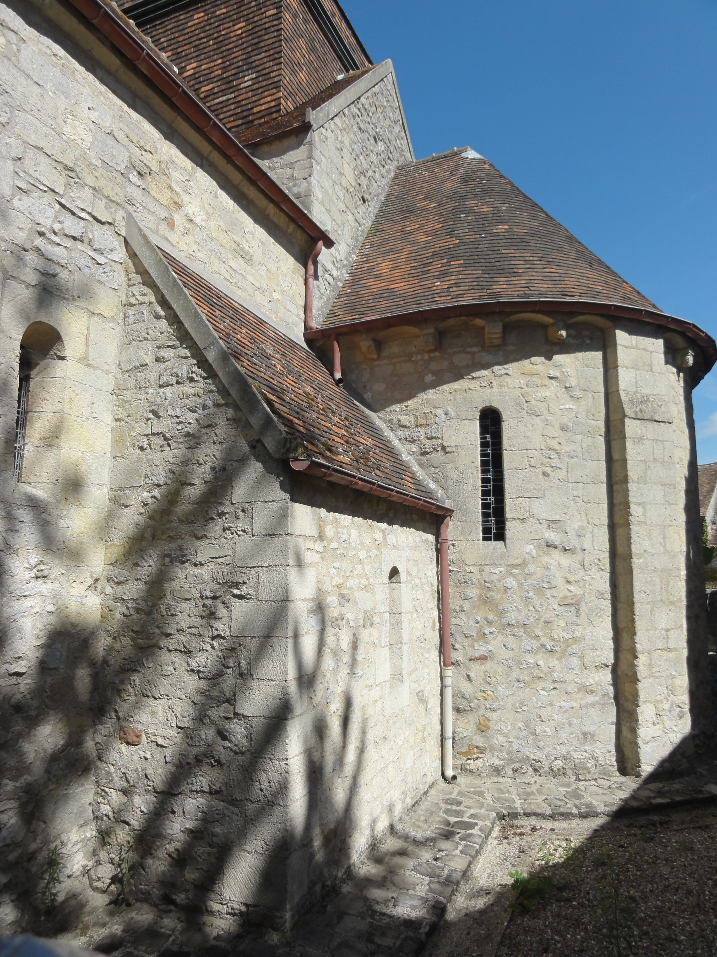 Église Saint-André de Moussy.